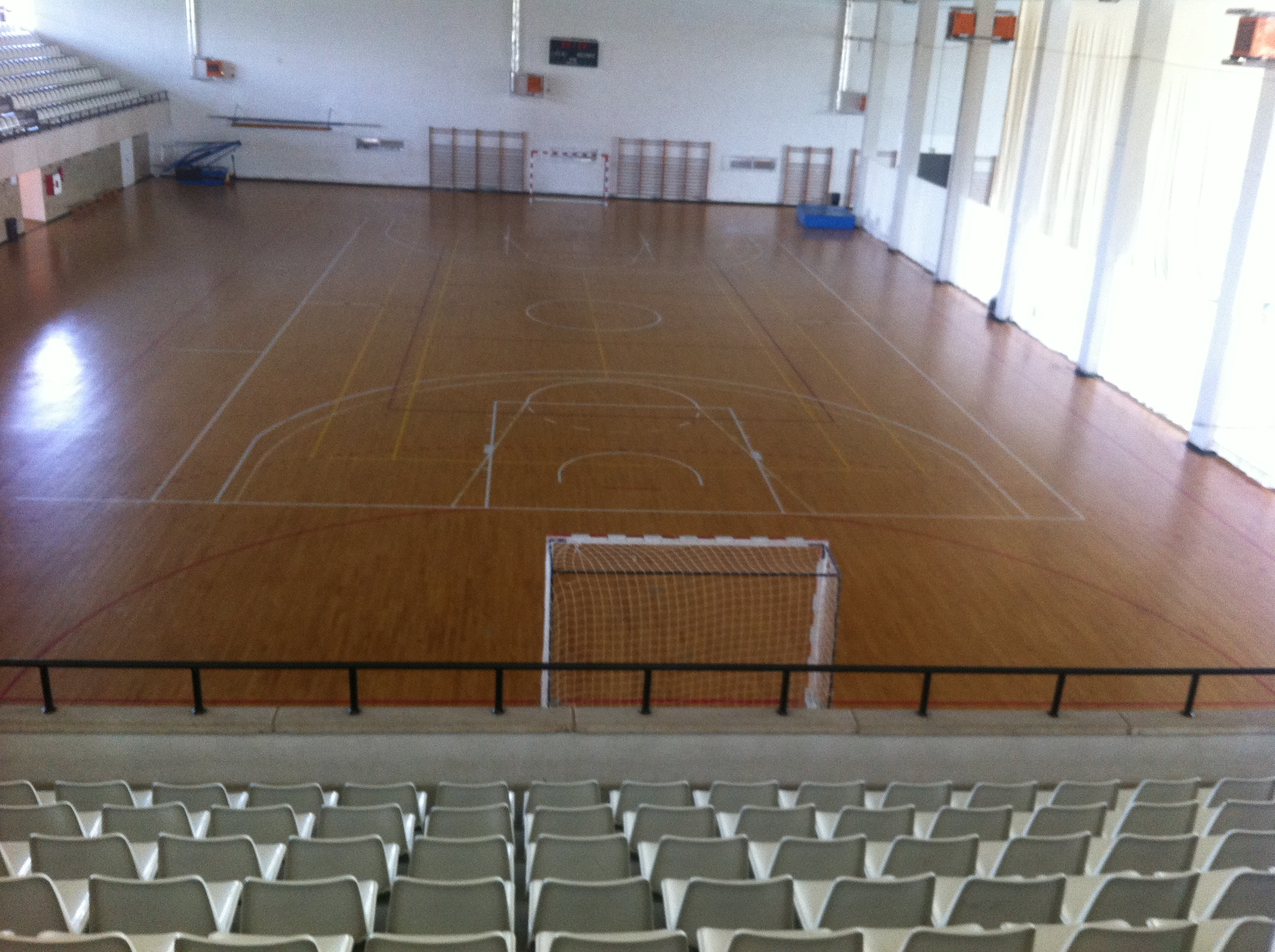 Pabellón deportes pista central